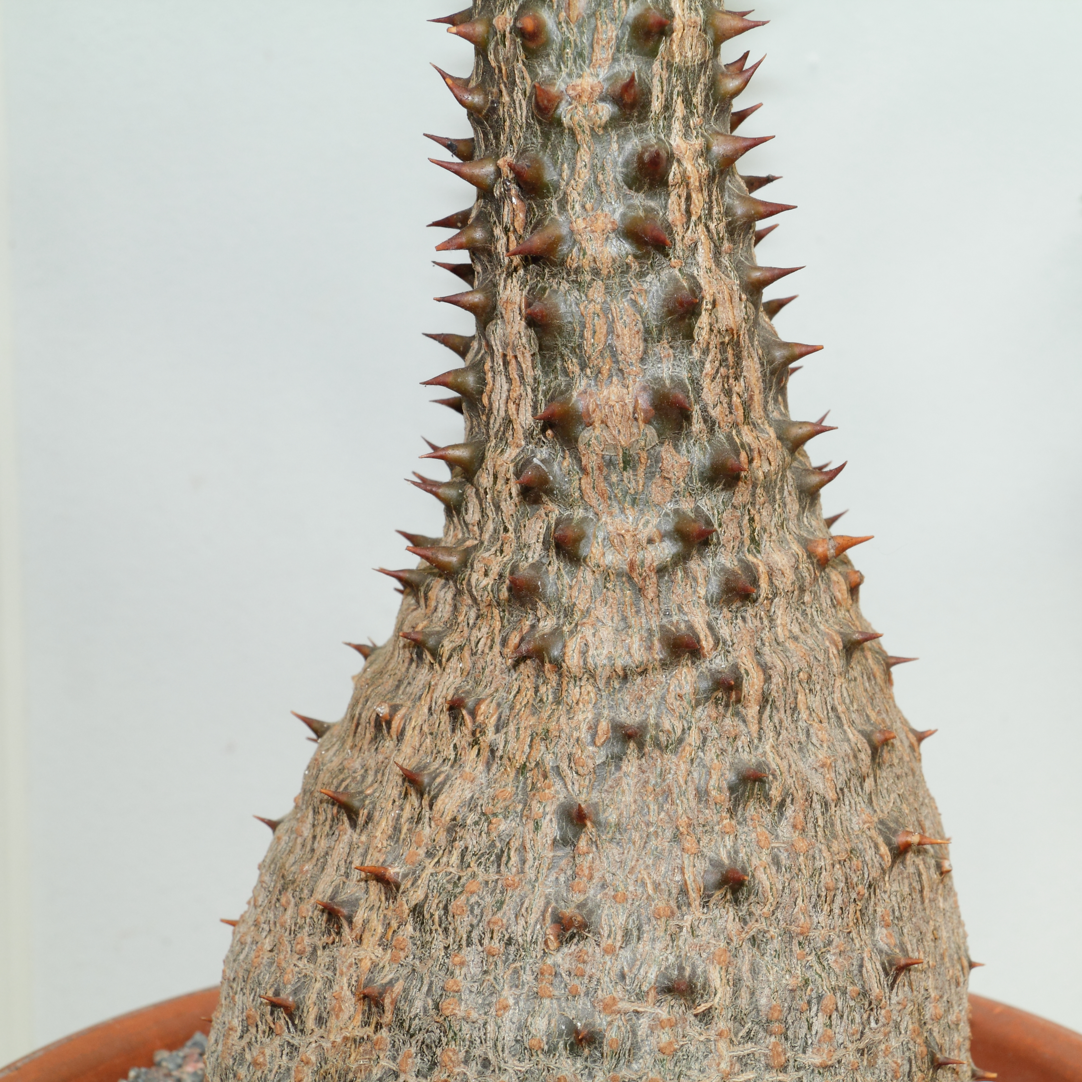 Pachypodium baronii, identifierad med hjälp av befintlig skylt vid Bergianska trädgården.